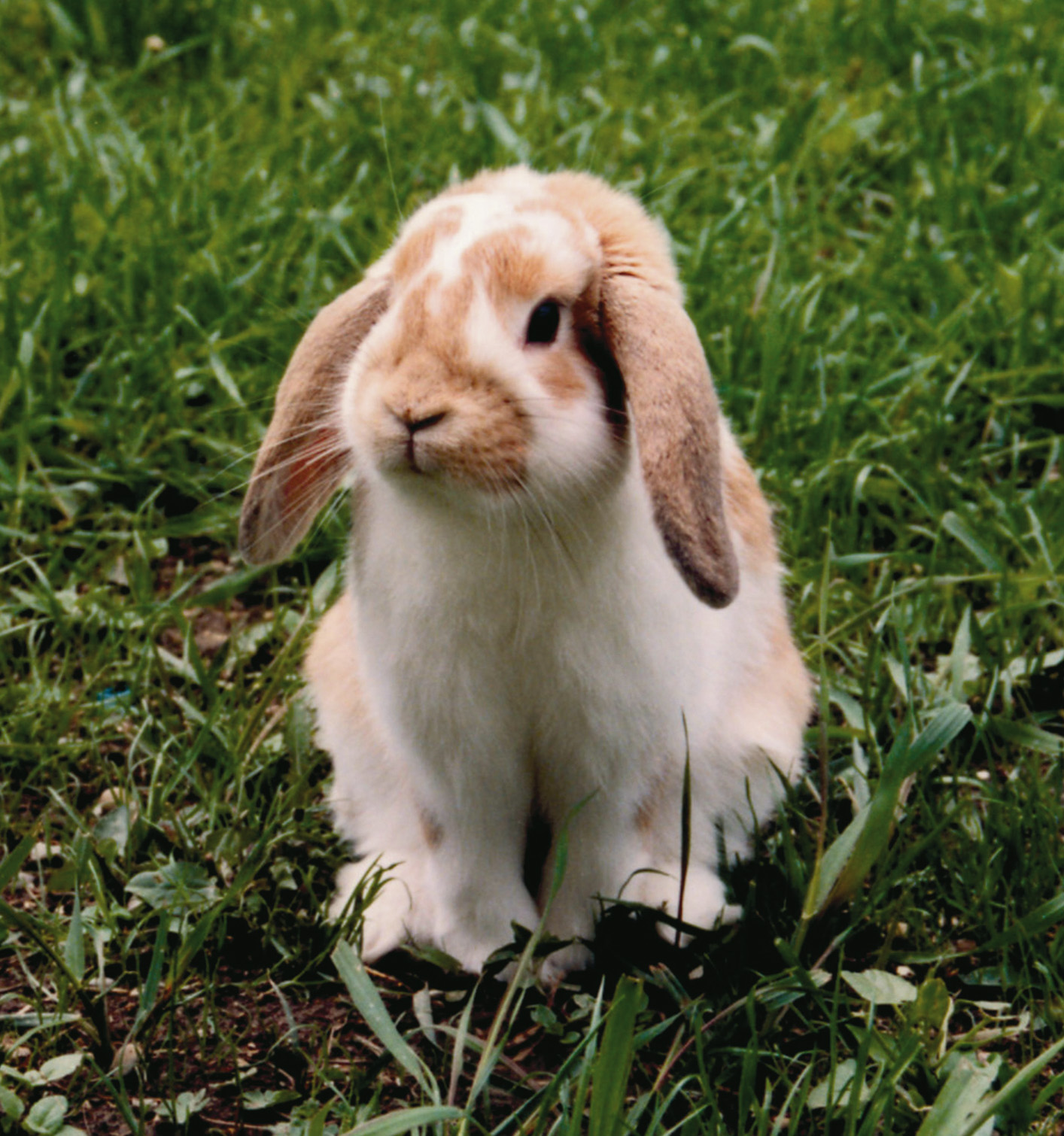 Widderkaninchen andere Versionen: keine